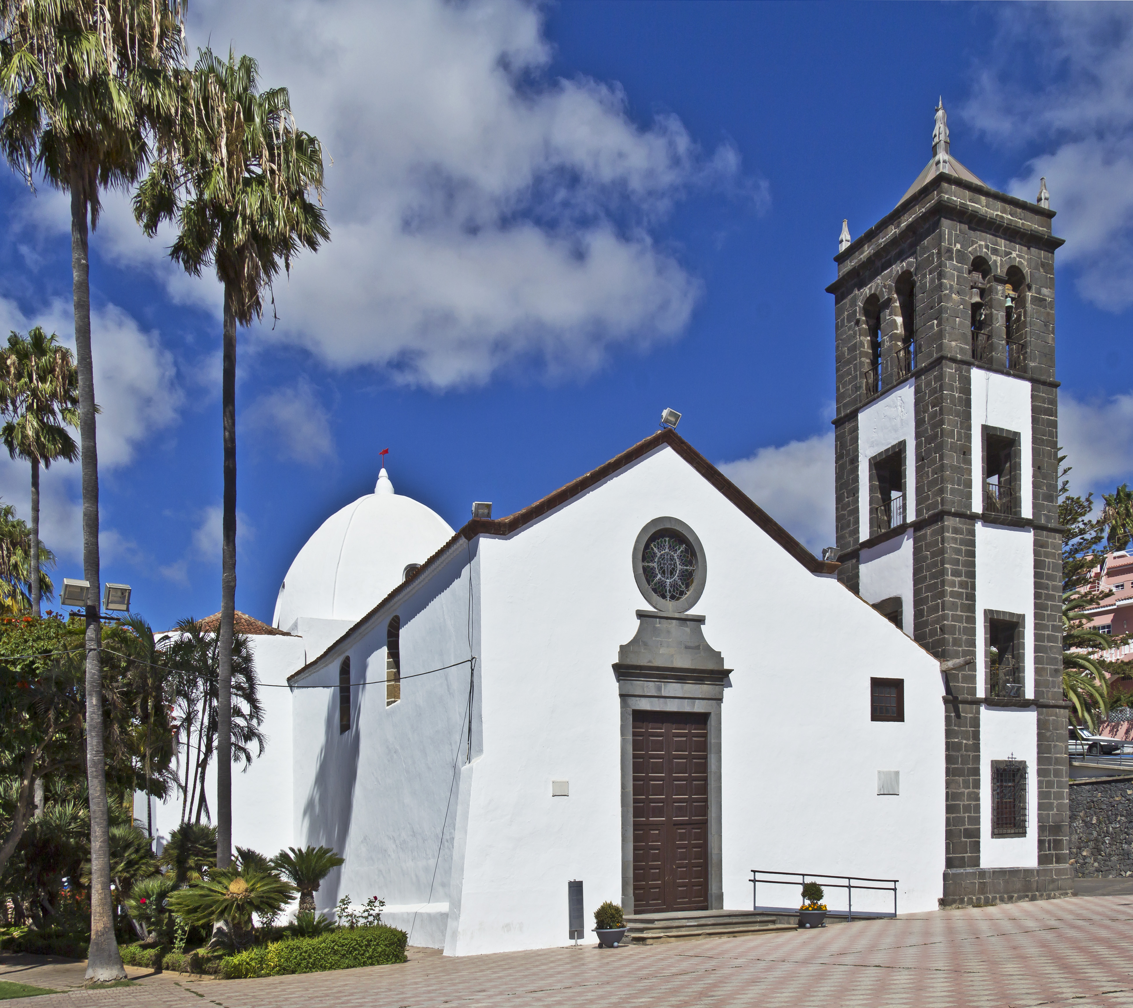 Die Kirche San Pedro Apóstol befindet sich in El Sauzal in der Provinz Santa Cruz de Tenerife.